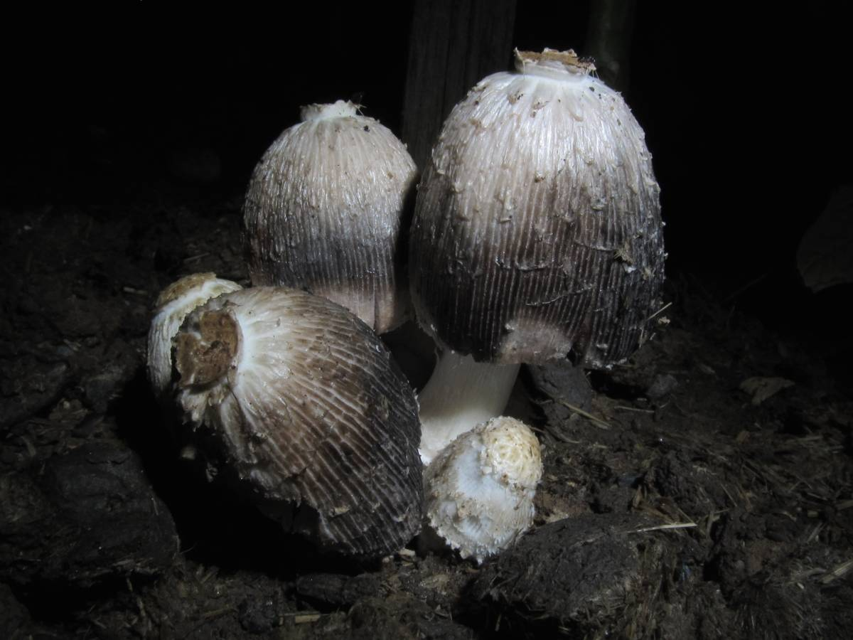 Coprinus sterquilinus (Fries) Fries